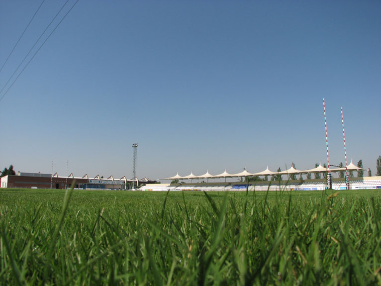 Imagen aletaoria 2/ Campo de rugby en Valladolid